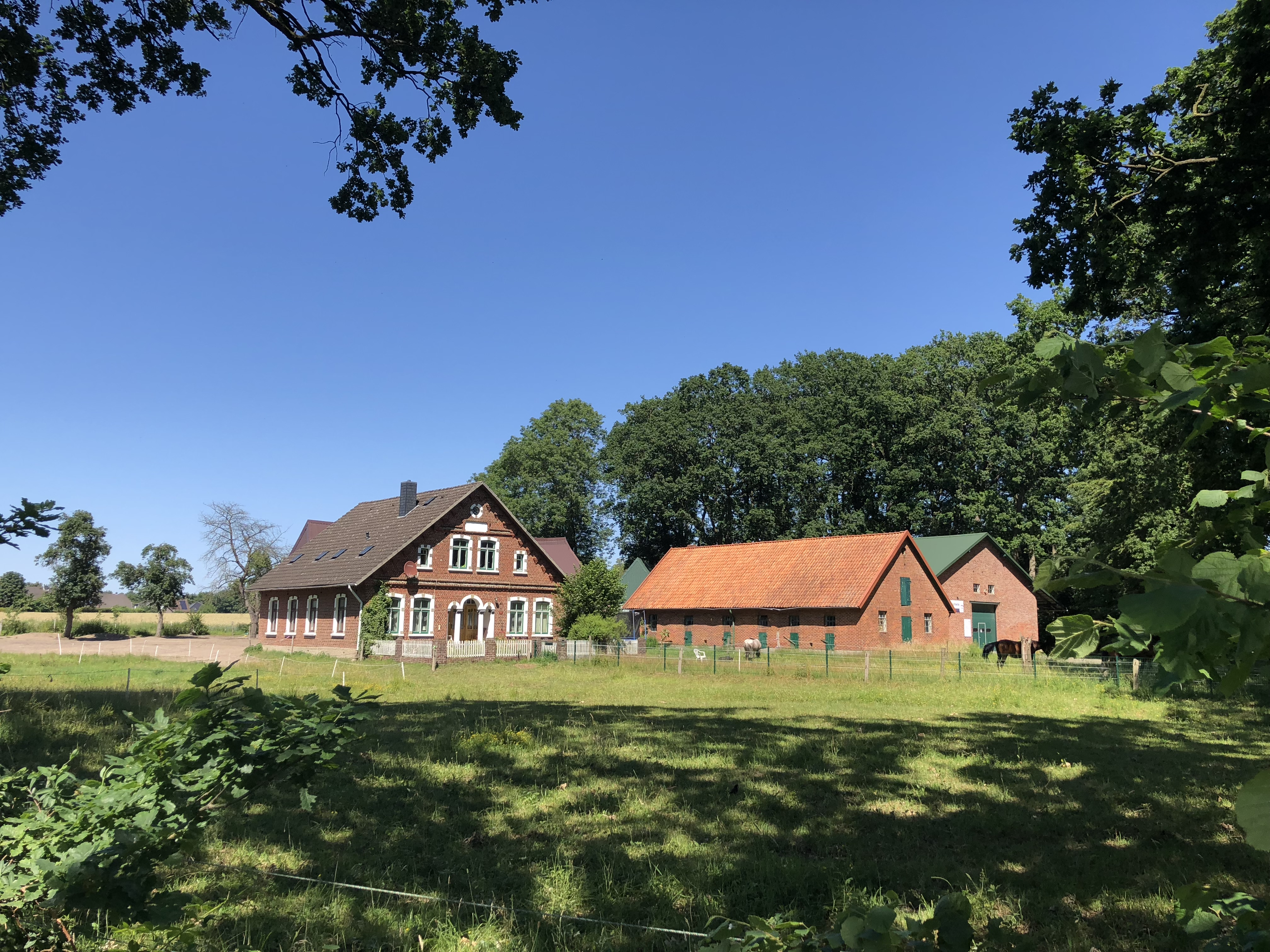 Hoff in Sounsiek